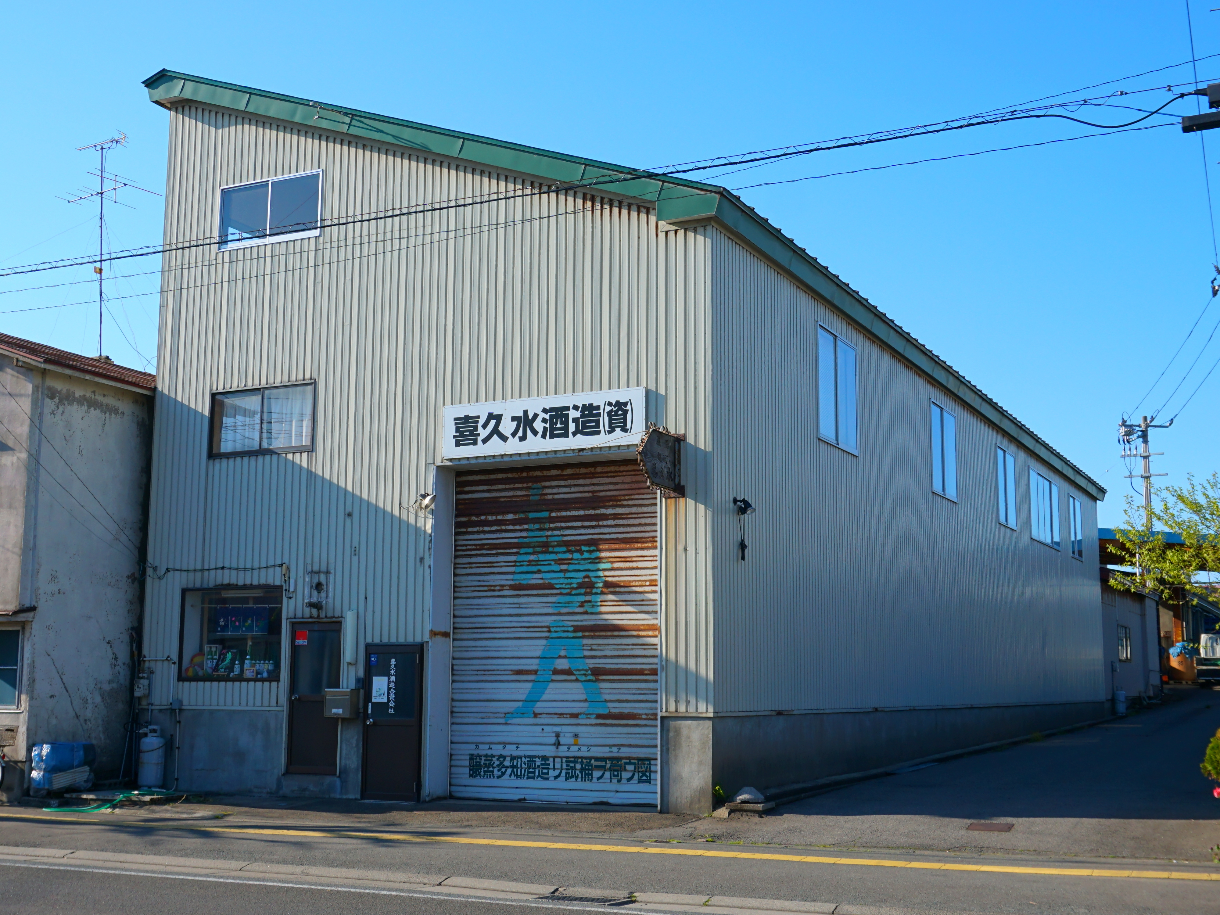 喜久水酒造（秋田県能代市）